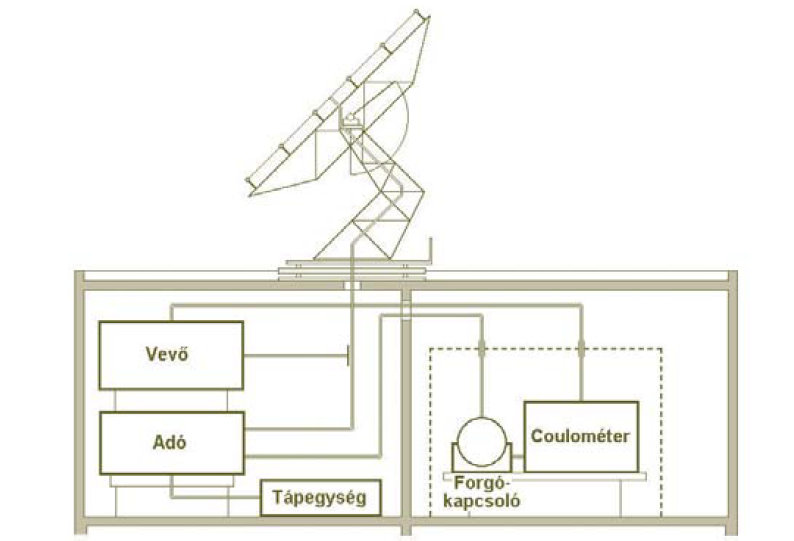 A magyar Hold-radar kísérlet elvi elrendezése.